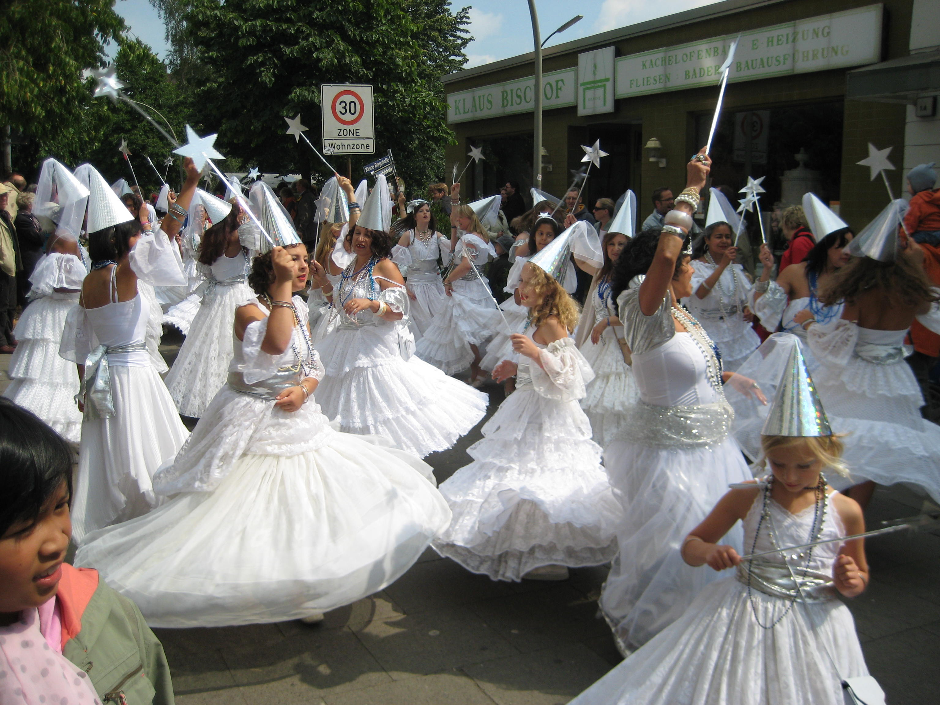 Spaßparade der Altonale in Altons am 15. Juni 2008, vor Einsetzen des Regens.